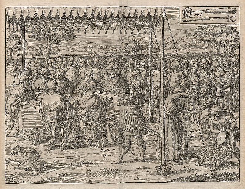 Original image description from the Deutsche Fotothek Kriegskunst & Ausbildung & Brandzeichen